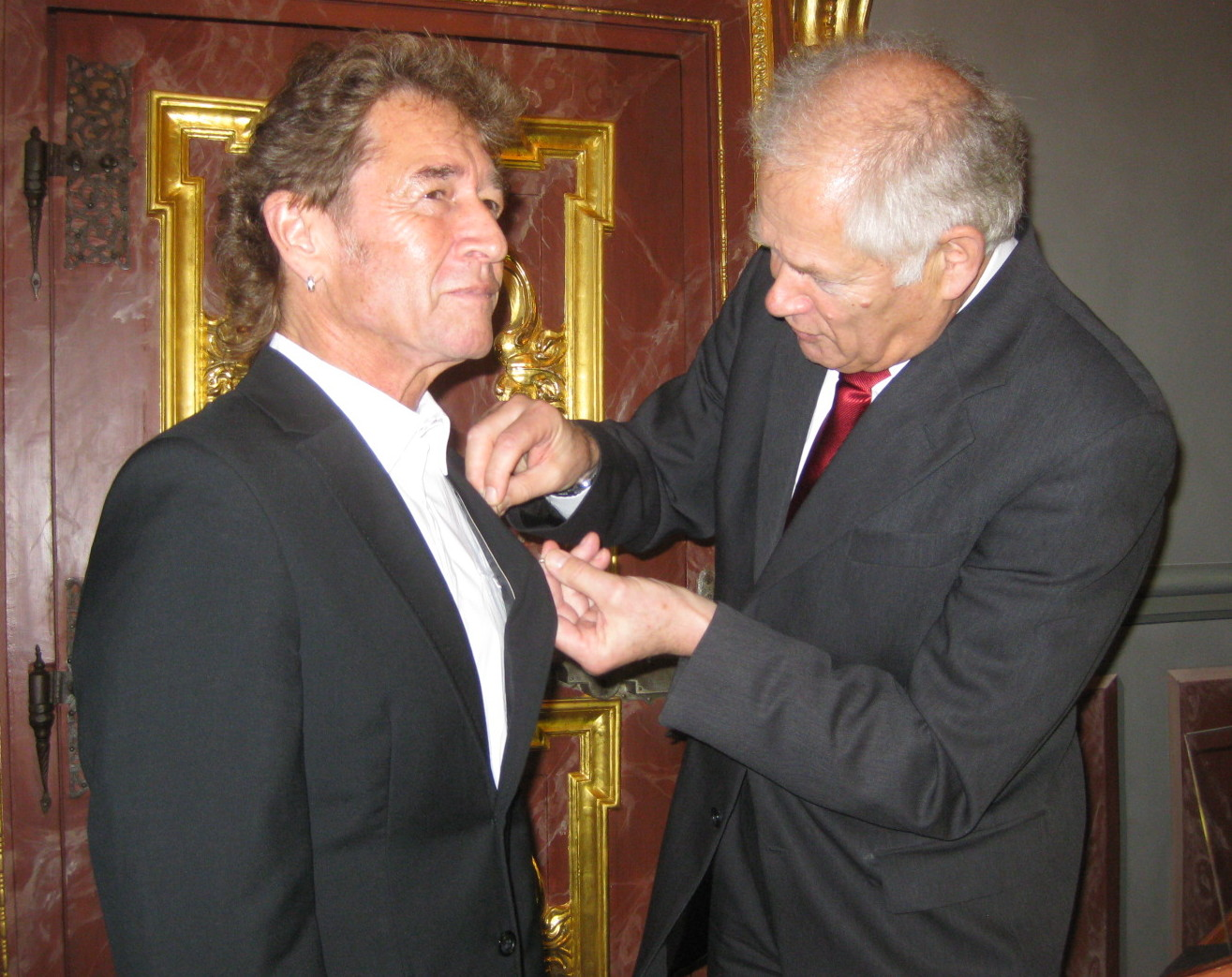 Verleihung des Courage-Preises am 17. September 2010 an Peter Maffay in Bad Iburg, rechts Gerd Schöwing, Initiator des Preises